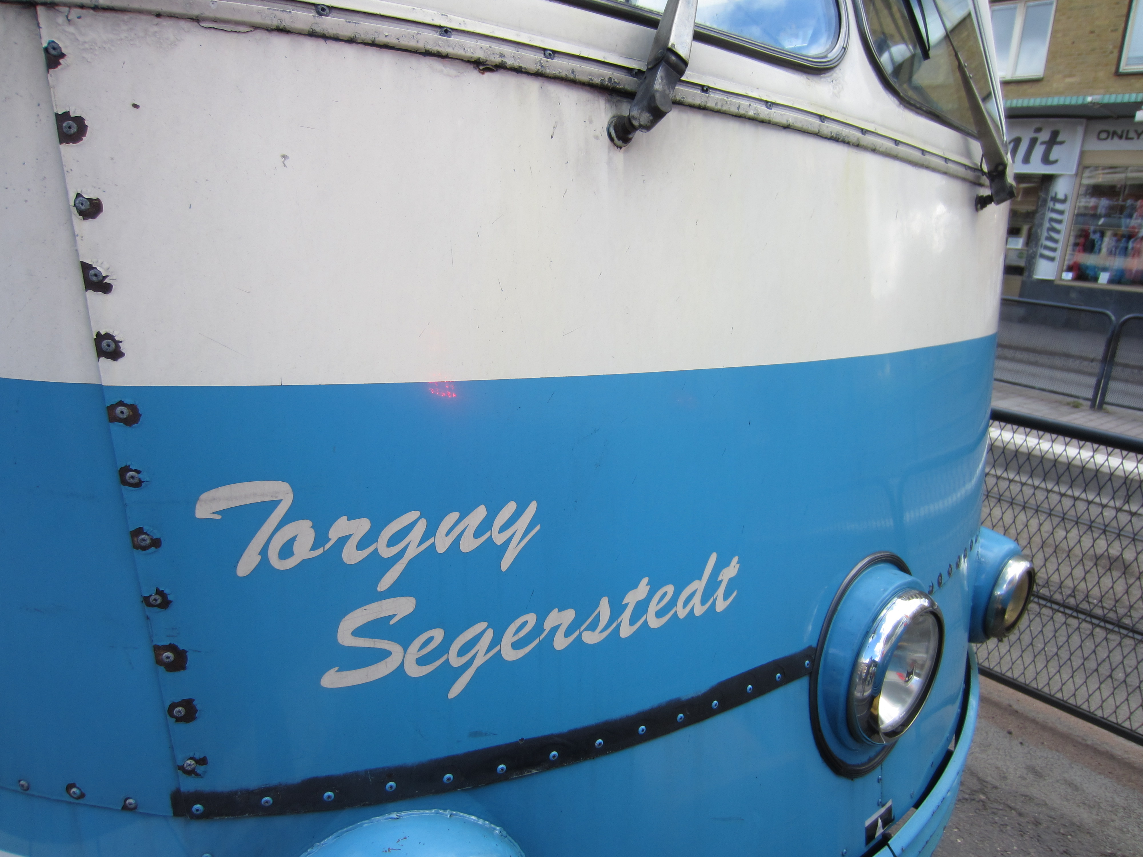 Spårvagn nr 758 i Göteborg bär Torgny Segerstedts namn.